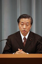 Minister Kenji Kosaka.